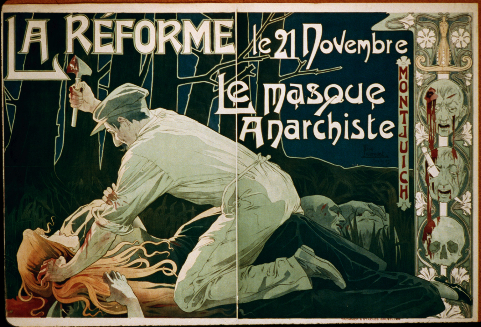 La Réforme, le 21 Novembre, le masque anarchiste